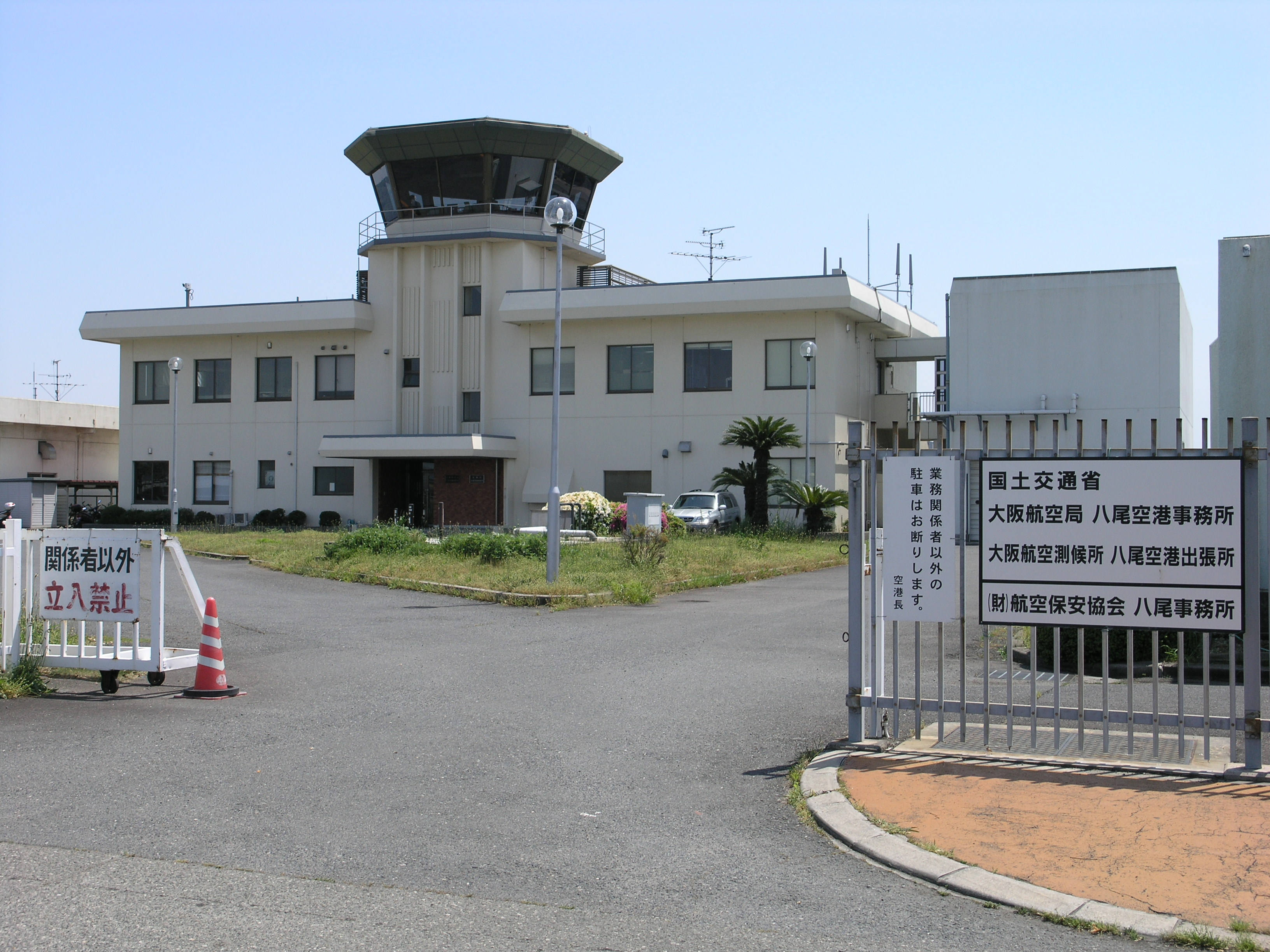 Yao Airport, Osaka, Japan